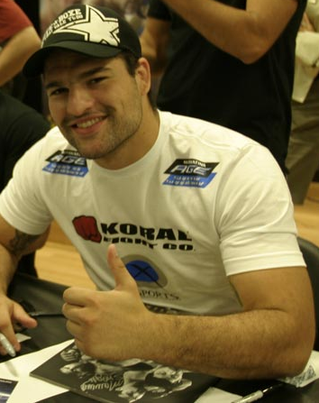 o Lutador brasileiro Maurício Rua